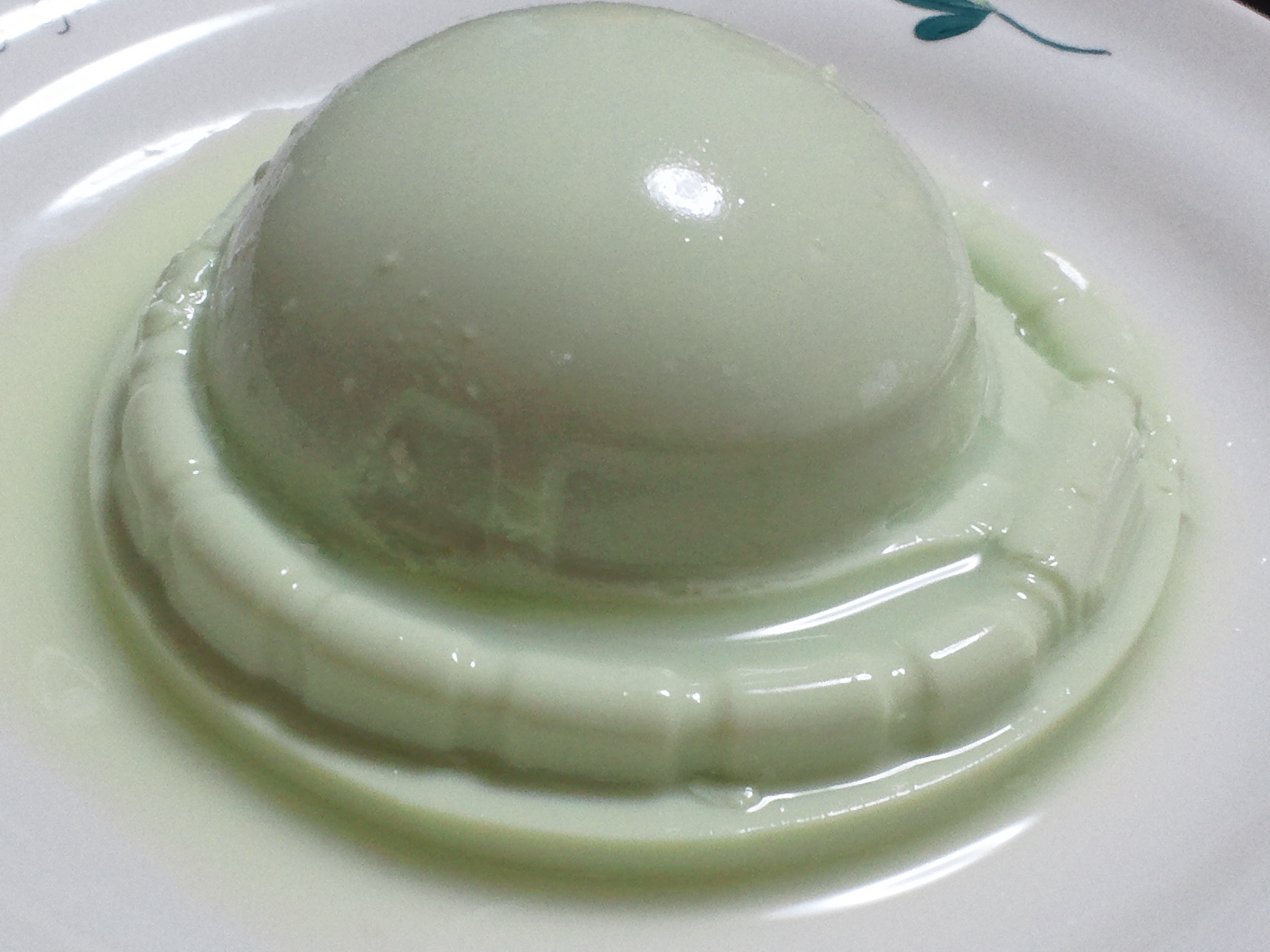 相模屋食料製のザクとうふ（えだまめ風味）